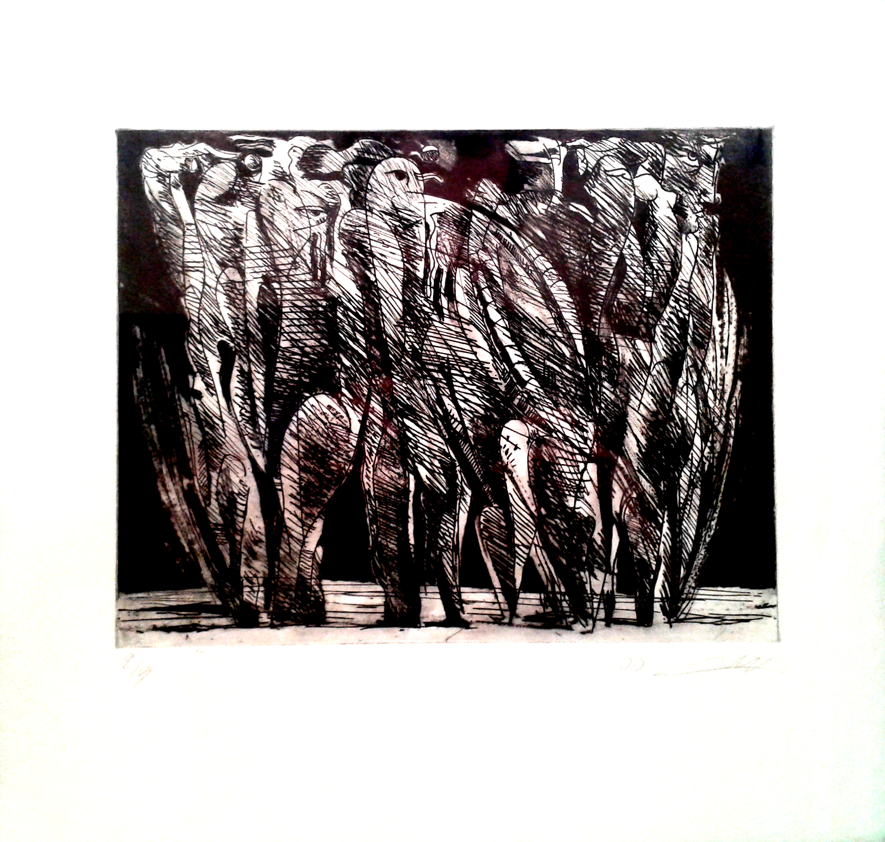 Ahmad Vakili, احمد وکیلی